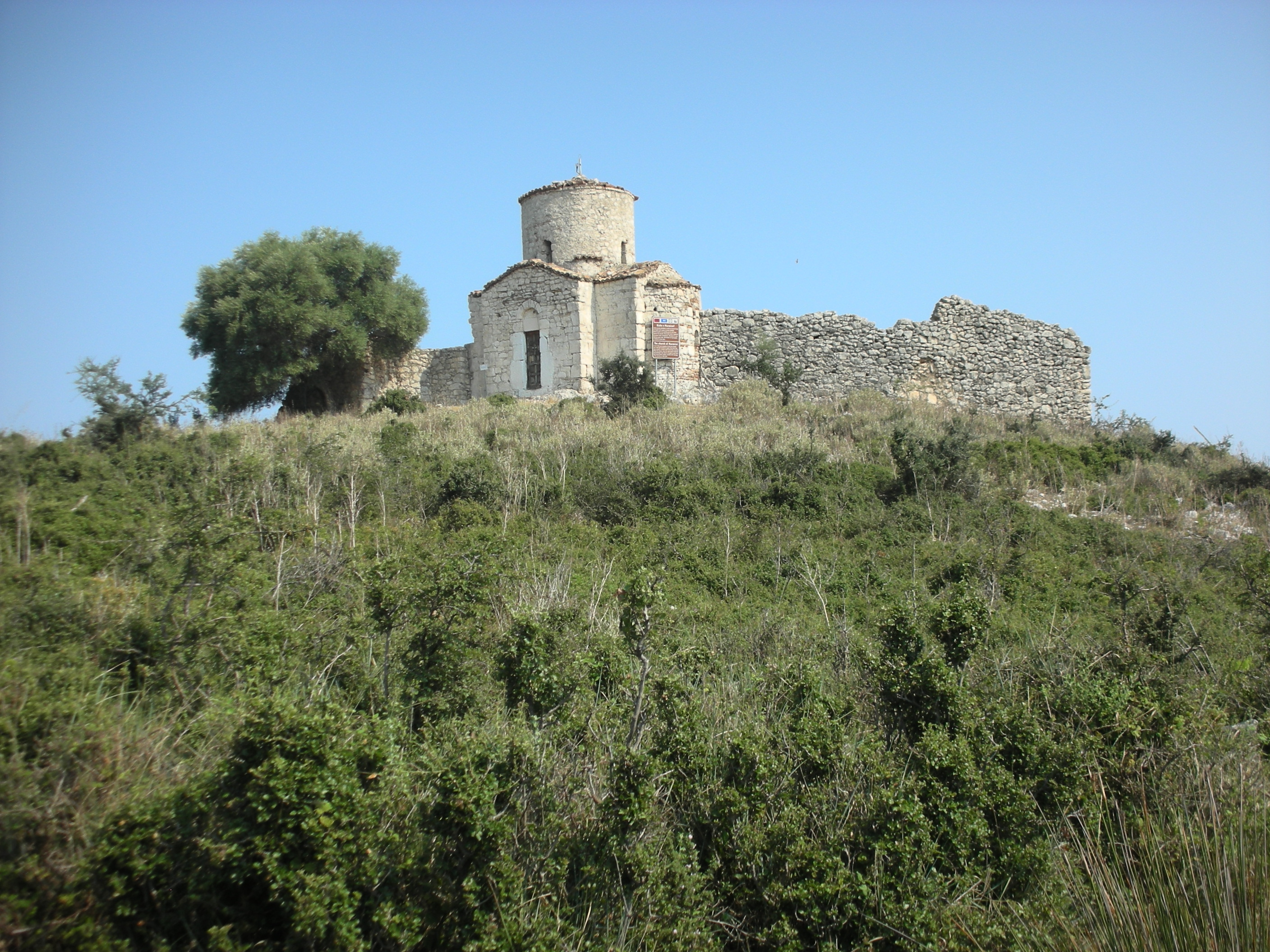 Kisha E Marmiroit